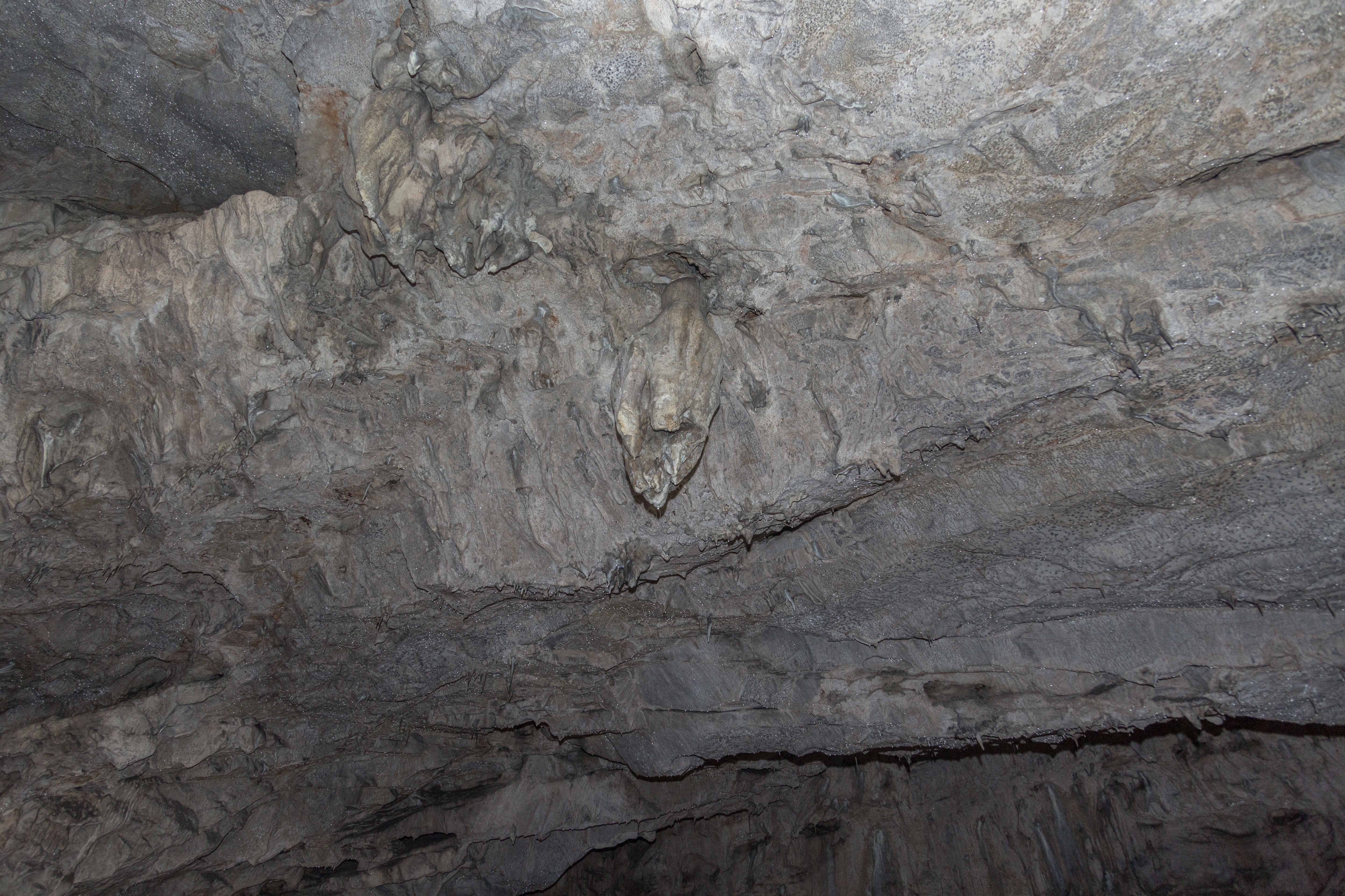 Капова пещера (Шульган-Таш), Бурзянский район This image is related to the protected area of Russia number 0220101